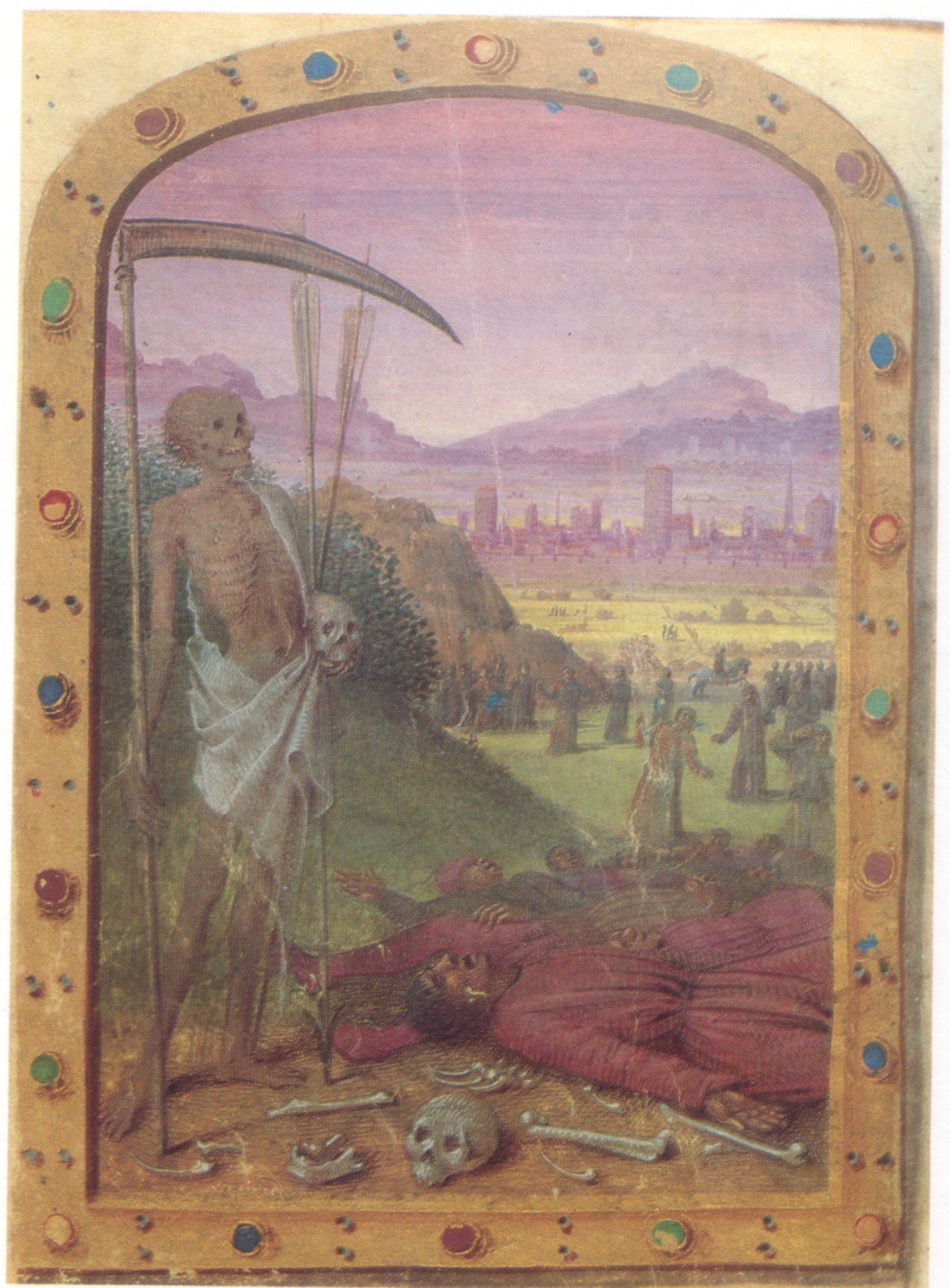 de Vauce-Hours